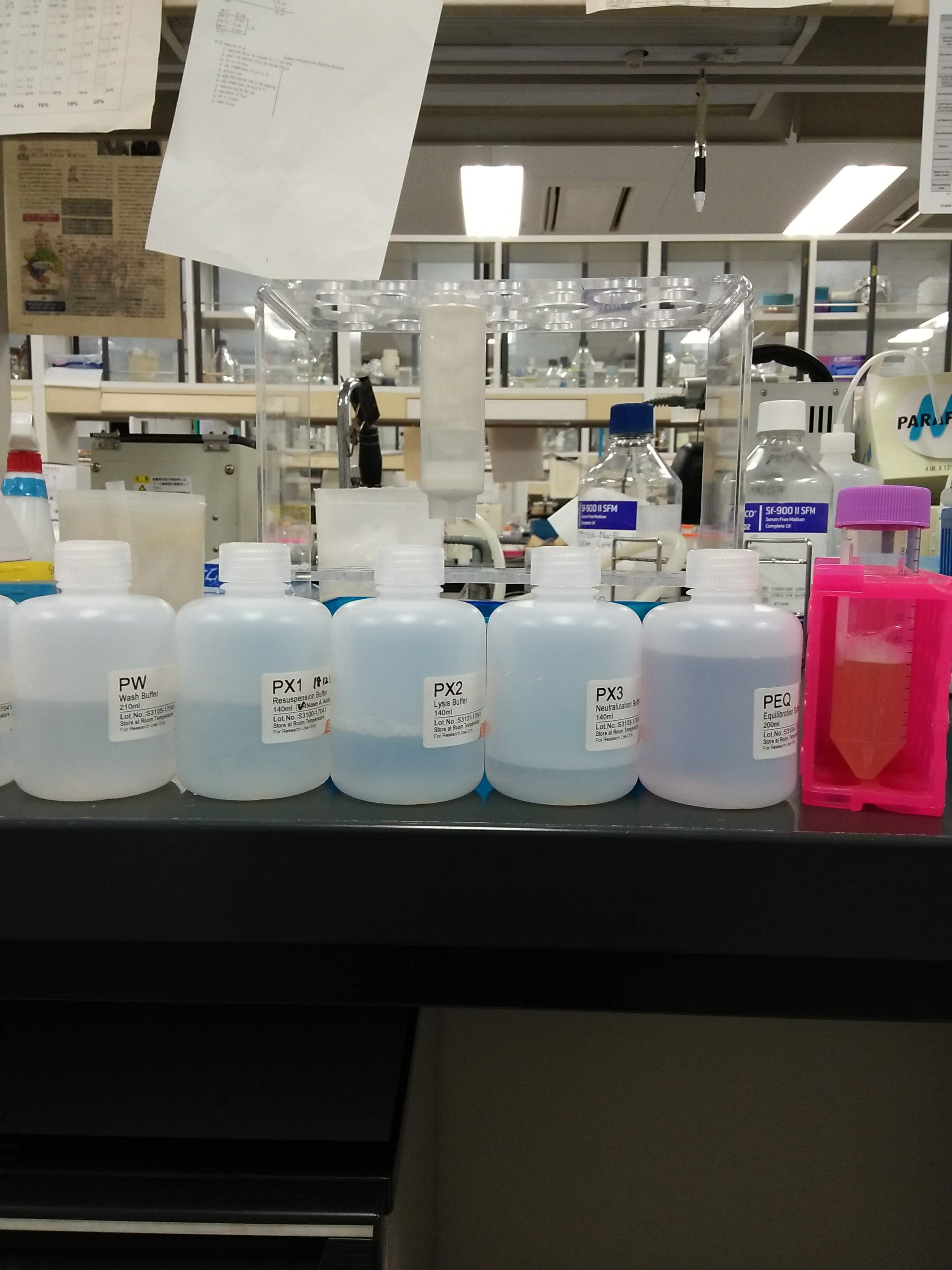 Large prep DNA plasmid using kit